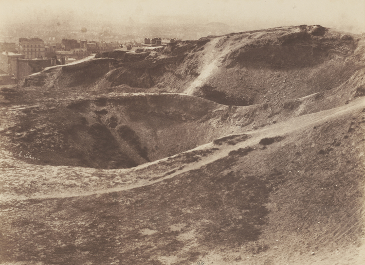 Plâtrières dites Carrières d'Amérique en 1852. Ces carrières de gypse étaient situées entre la rue Manin (au nord), la rue de Crimée (à l'Ouest), la rue Mouzaïa (au Sud) et les boulevards des Maréchaux et Serrurier (à l'Est), à Paris. Photographie d'Henri Le Secq.